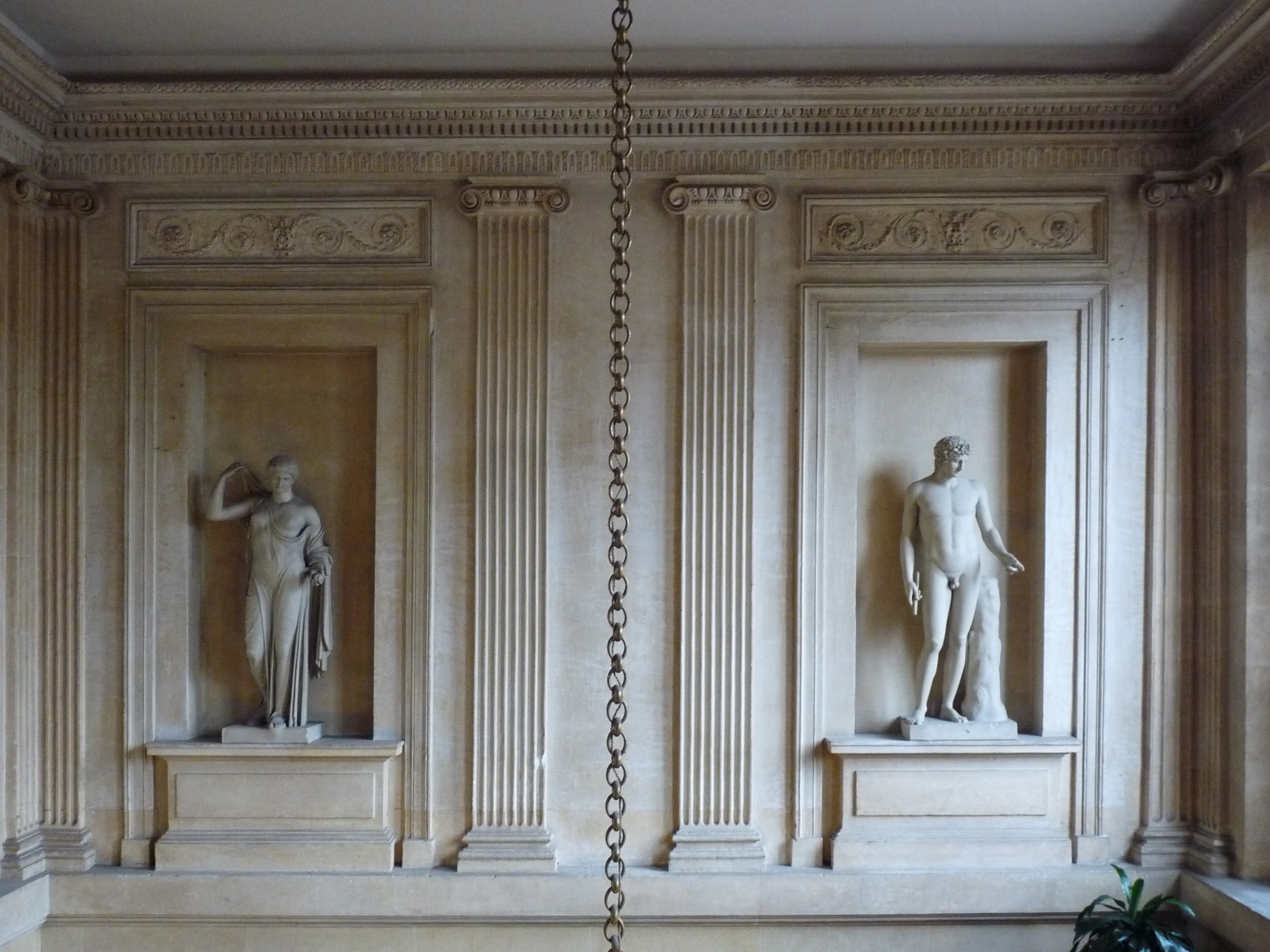 Sculpture dans la cage d'escalier du hôtel du Châtelet, Paris. Photo prise lors des journées du patrimoine 2011.